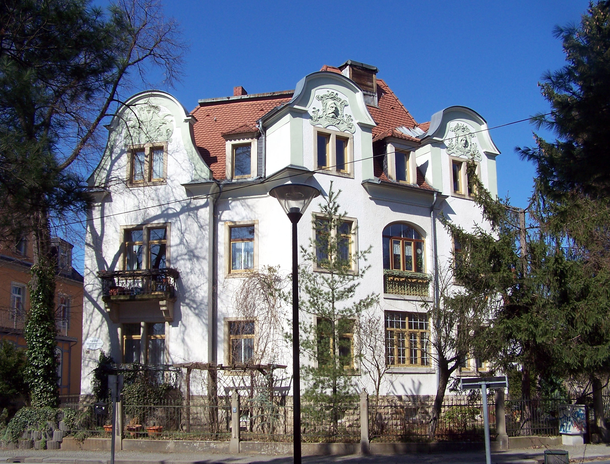 Einsteinstr. 28 in Radebeul